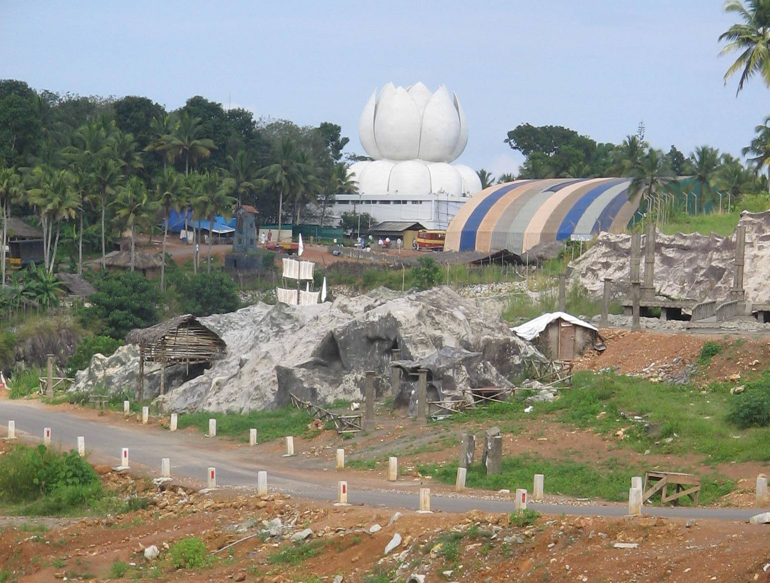 ആശ്രമം വിദൂരദൃശ്യം